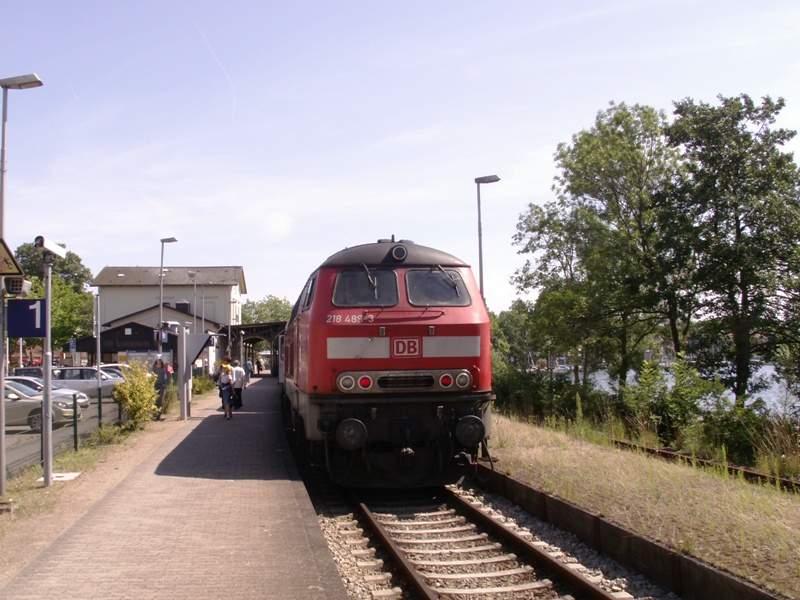 218 489-3 im Hauptbahnhof Plön